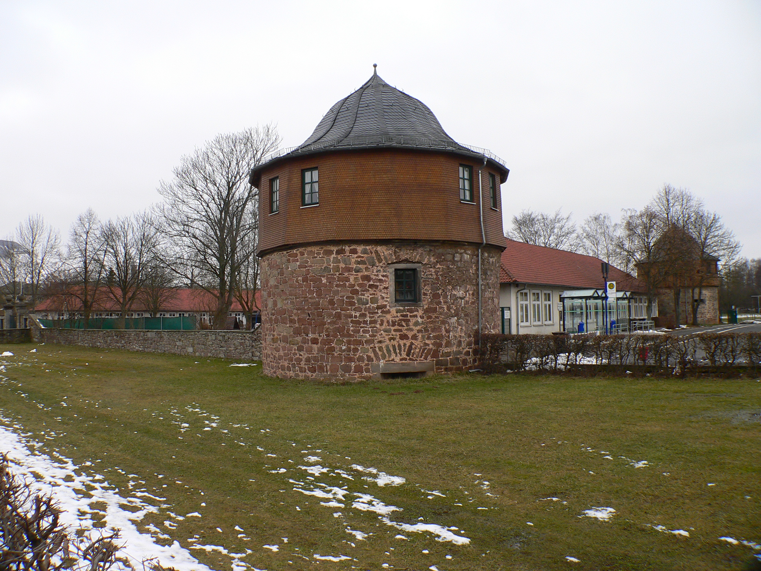 Schloss Neuhof in Neuhof, Landkreis Fulda, Hessen.